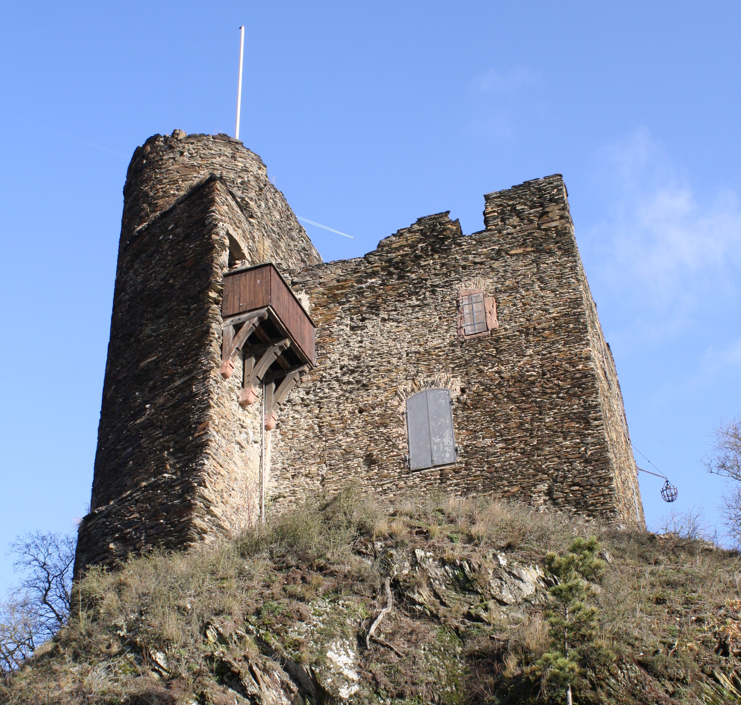 Burg ähnliche Ruine wurde wahrscheinlich als Vorposten zur Sicherung der Stadtbefestigung der Stadt Lorch / Rhein gnutzt